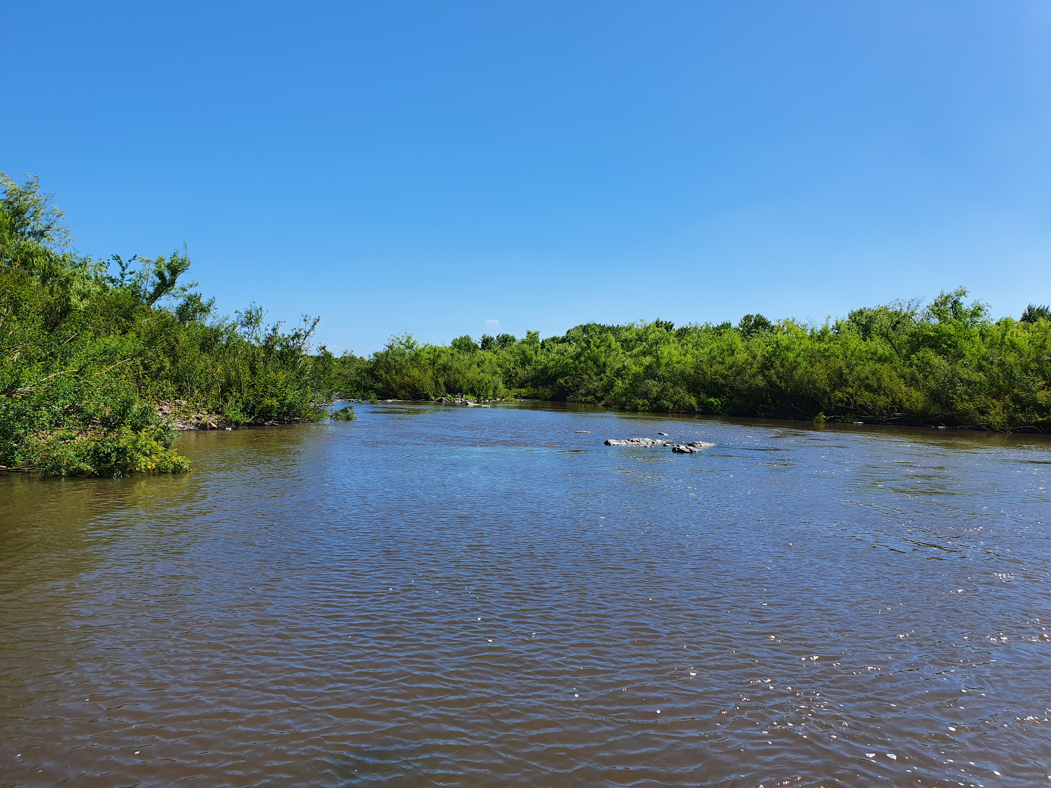 Río Santa Lucía Chico a la altura de Paso Severino en el departamento de Florida, Uruguay. Vista hacia el sur, desde la presa de Paso Severino.